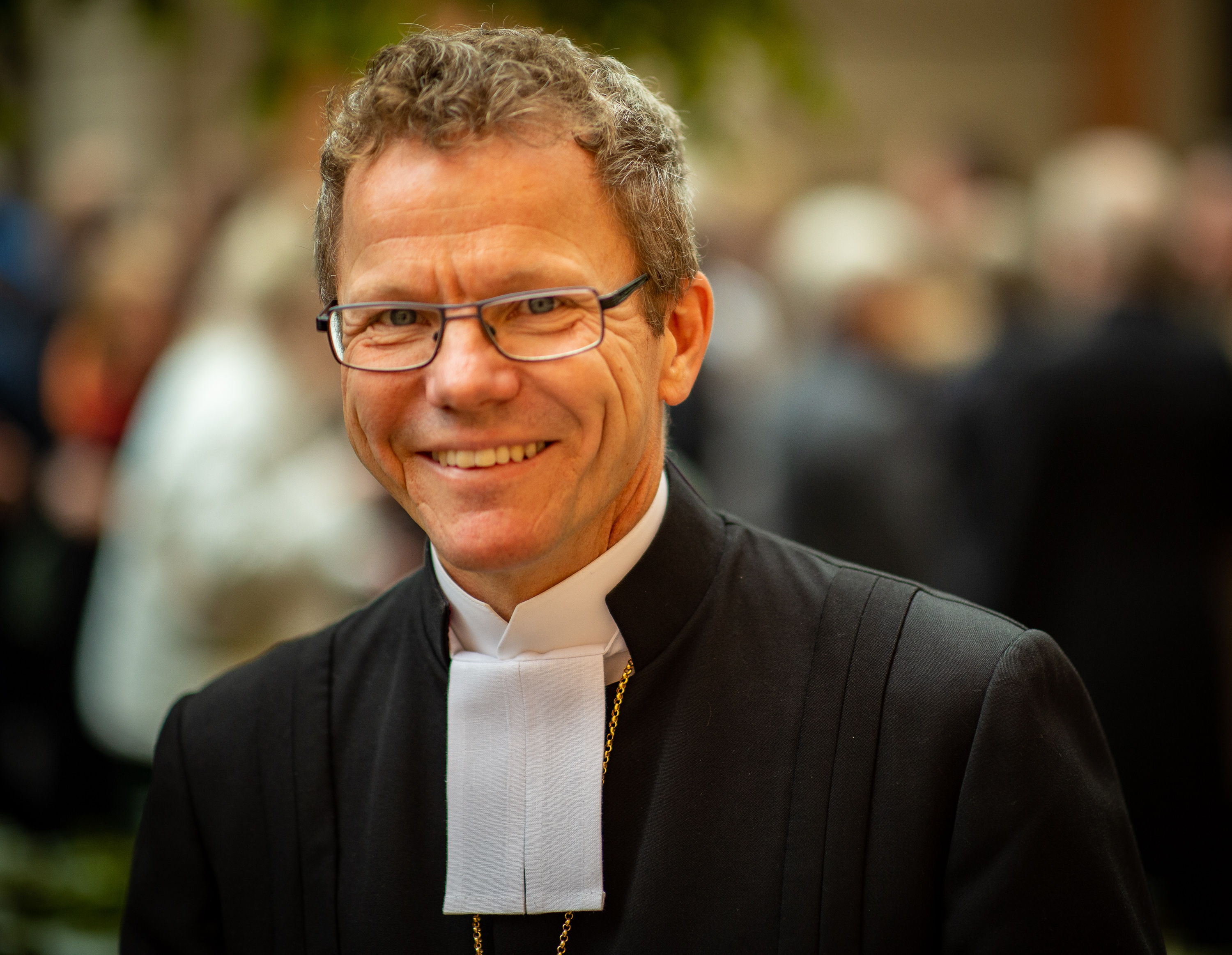 Svenska Kyrkan i Stockholms stifts nye biskop Andreas Holmberg efter mottagningsmässan i Storkyrkan den 29 september 2019. Foto: Greger Hatt, Predikoverkstan